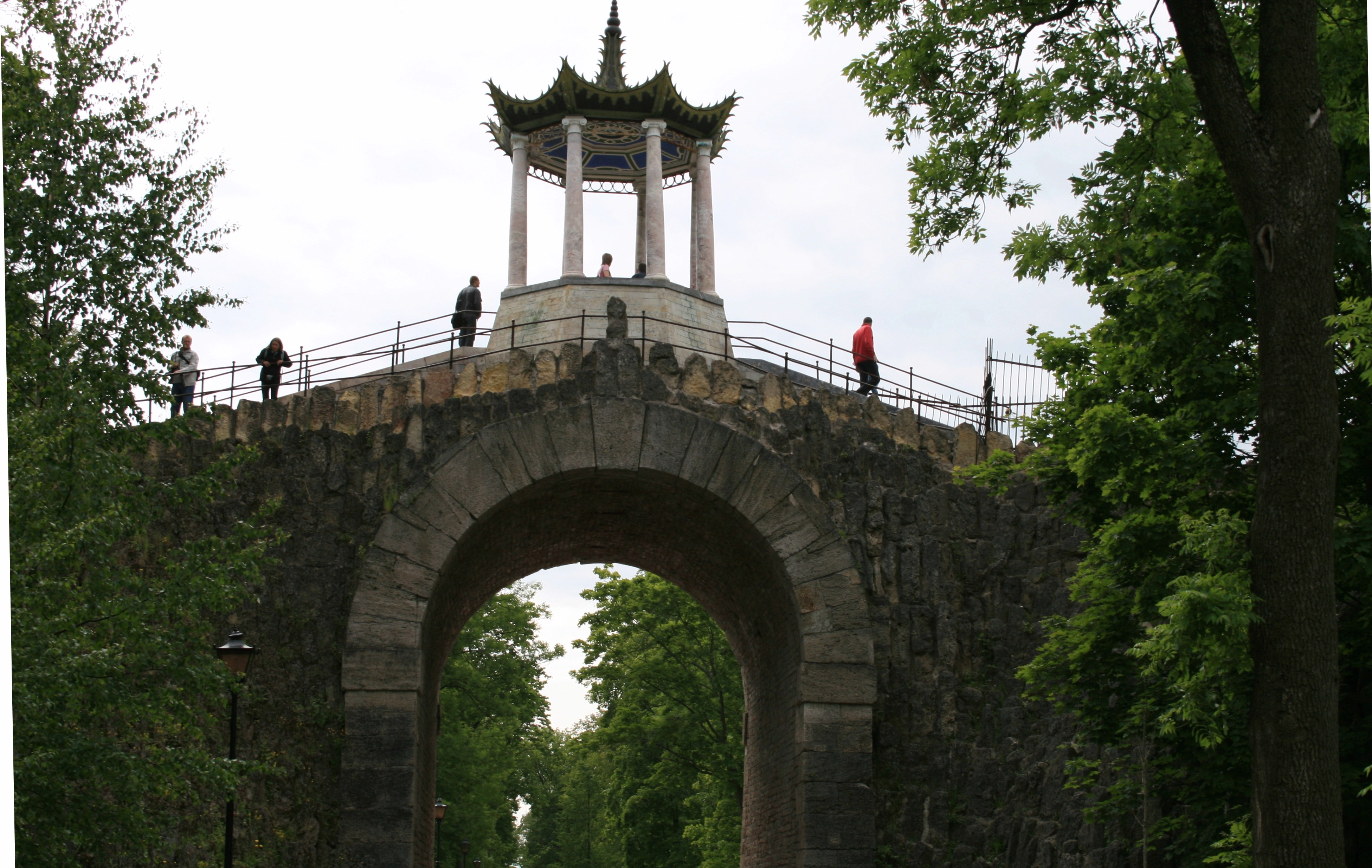 "Большой Каприз" в Александровском парке Царского села